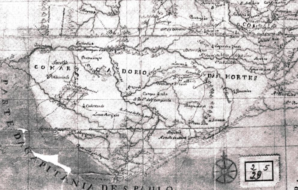 Abecedário de Moradores da Capitania de Minas Gerais